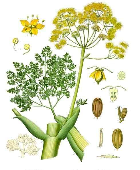 Galbanum. A B Theile der blühenden Pflanze, nat. Grösse; 1 Fiederstück mit den Blättchen letzter Ordnung, vergrössert; 2 männliche Blüthe, desgl.; 3 Staubgefässe, desgl.; 4 weibliche Blüthe, desgl.; 5 Fruchtknoten im Längsschnitt, desgl.; 6 derselbe im Querschnitt, desgl.; 7 Früchte, nat. Grösse; 8 und 9 Früchtchen von der Rücken- und Bauchseite, desgl.; 10 u. 11 Früchtchen im Längs- und Querschnitt.